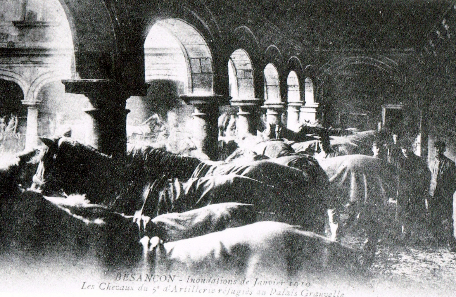 Les cheveaux du palais Granvelle lors de la crue du Doubs de 1910 à Besançon (Doubs, France).